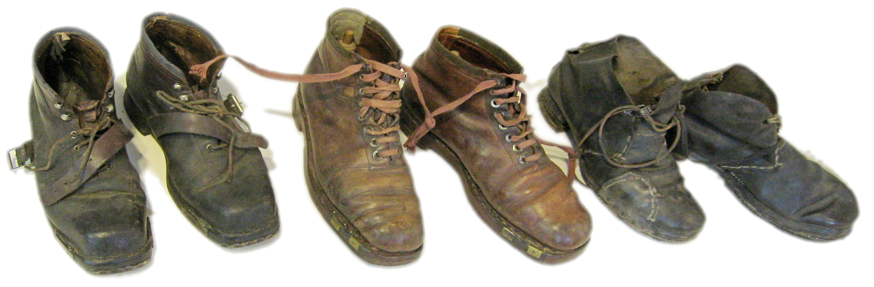 Skischuhe von 1929 bis 1950 im Museum in Sankt Blasien